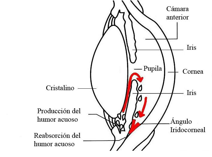 Esquema anatómico en castellano para explicar el flujo del humor acuoso en el interior del ojo